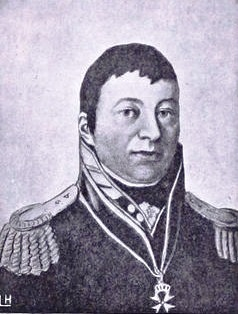 Ernst Gustaf von Hertzen